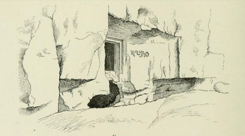 תמונות ושרטוטים מהאתר עראק אל אמיר שצילם או שרטט קלוד קונדר בסקר ארץ ישראל המזרחית בשנת 1881. שרטוט מערה 13 עם כתובת